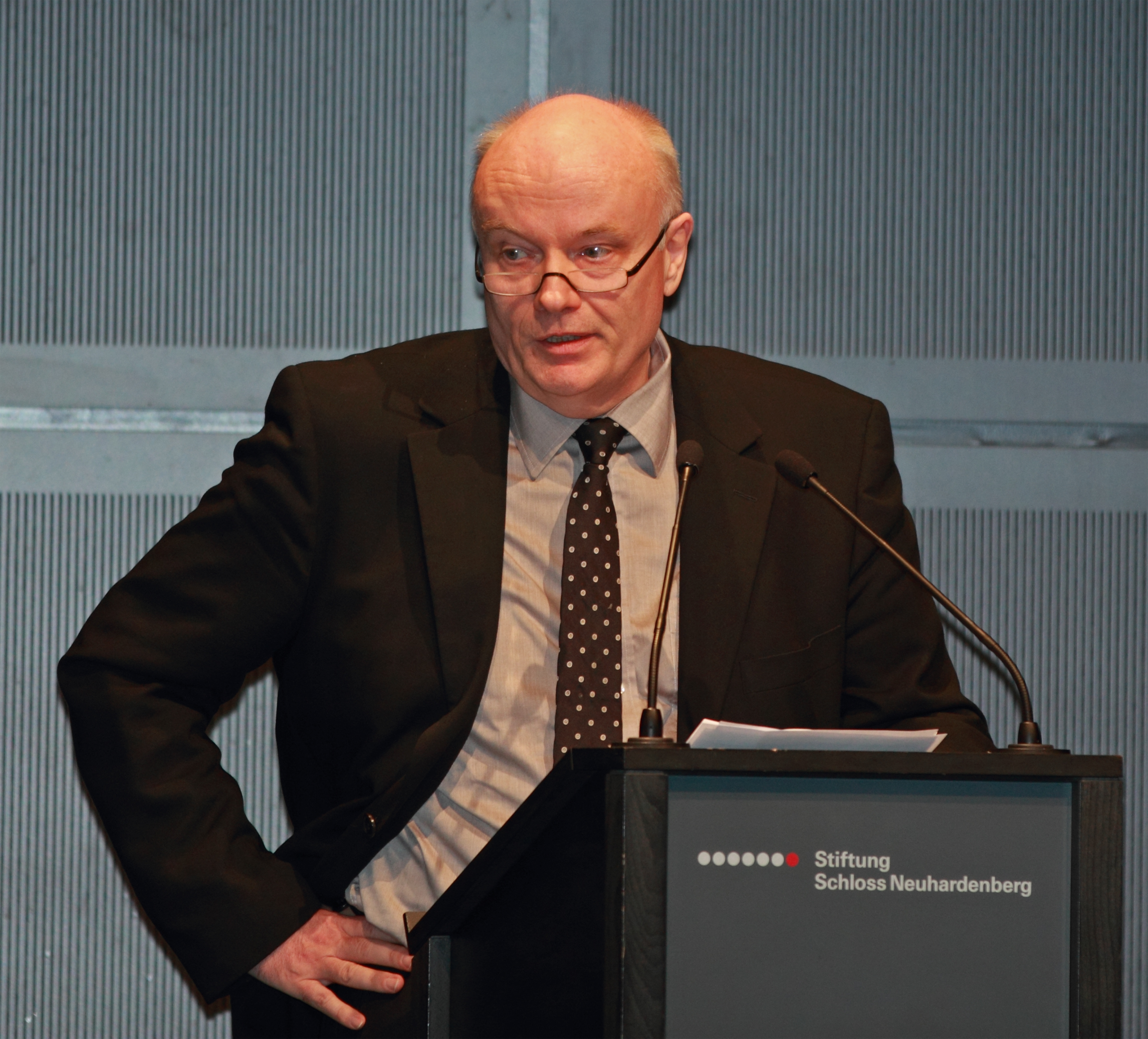 Prof. Volkhard Knigge